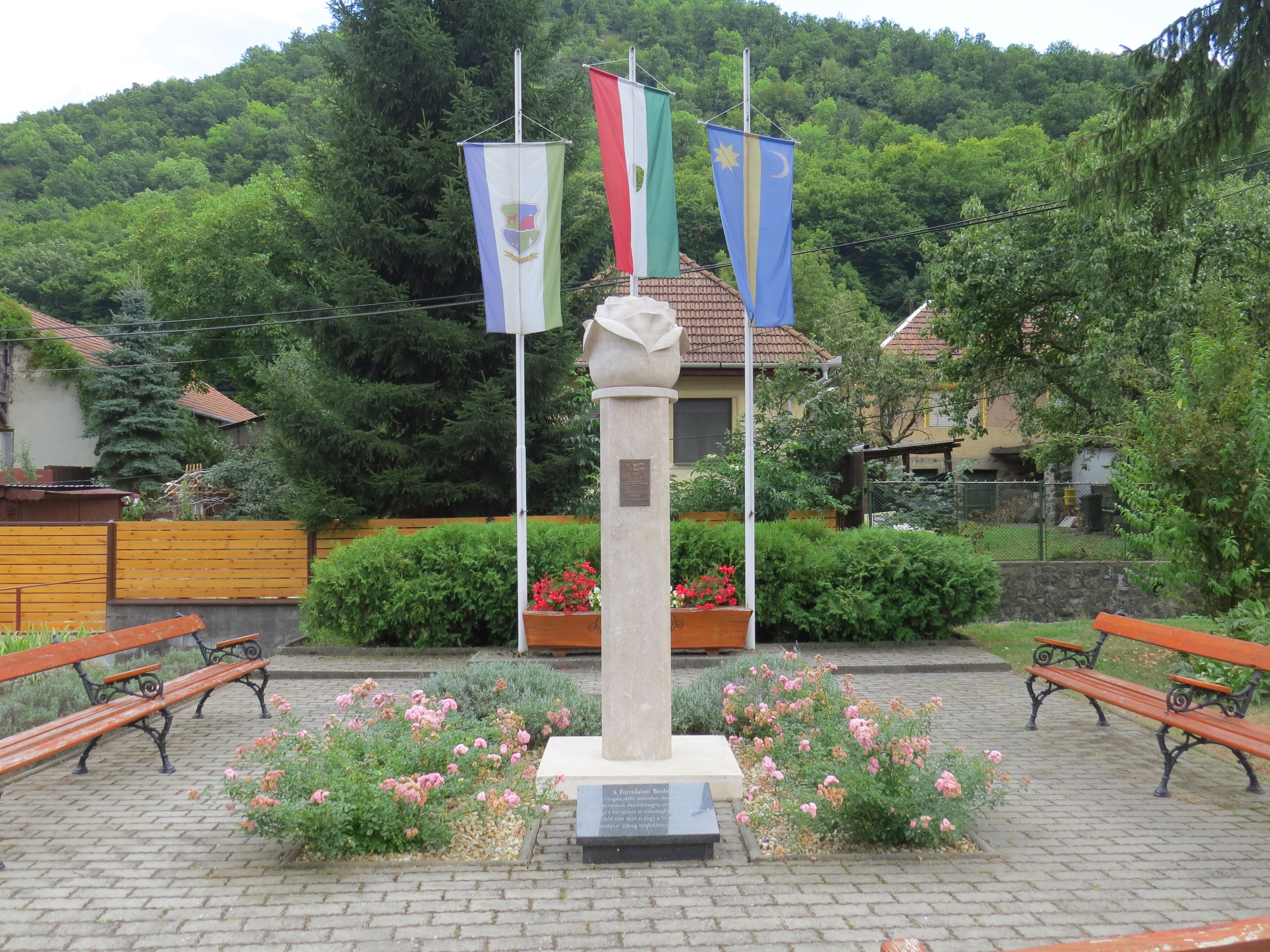 A Szarvaskő Önkormányzatának épülete előtt álló "Zászló Park", elsősorban a nemzeti ünnepek alkalmával tartott megemlékezések helyészínéül szolgál a település lakói számára. A téren három árbócrúd áll, melyeken balról a község lobogója, középen Magyarország zászlaja, míg jobb oldalon a székely zászló függ. A zászlósor előterében a "Forradalom Bimbója" című emlékmü áll, melyet az 1956-os Emlékbizottság támogatásával, Szarvaskő Község Önkormányzata állíttatott 2017-ben. A kompozíció Horváth Tibor szobrászművész alkotása.